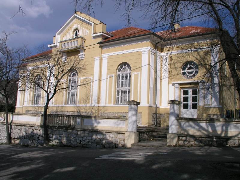 Narodni hrvatski dom, Dramalj, Hrvatska